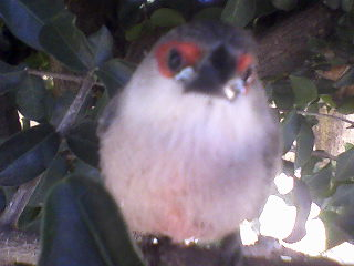 Filhote de pássaro numa árvore (Paulínia-SP, Brasil)